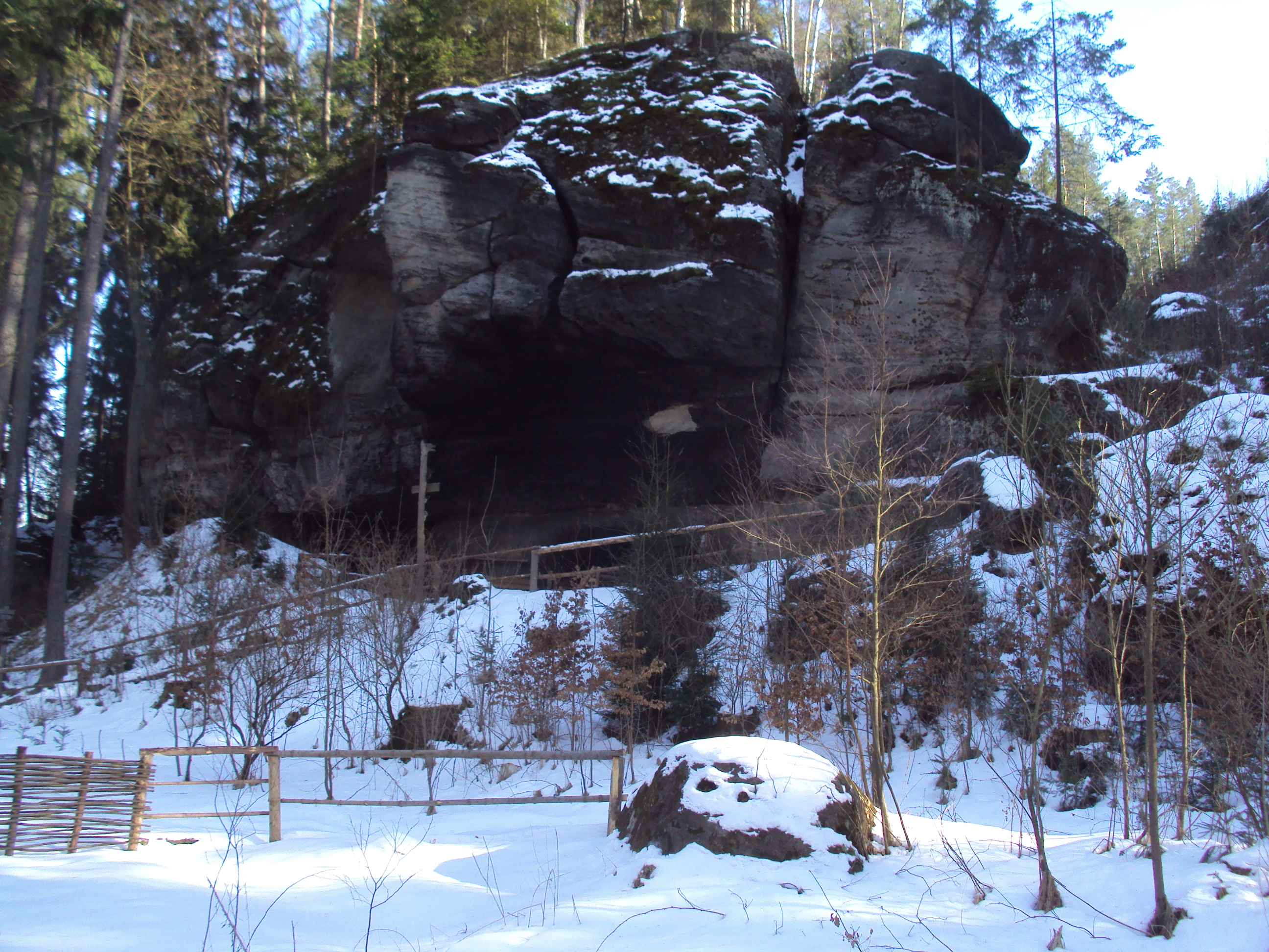 Na této ostrožně stál hrádek Vejrov - Výrov